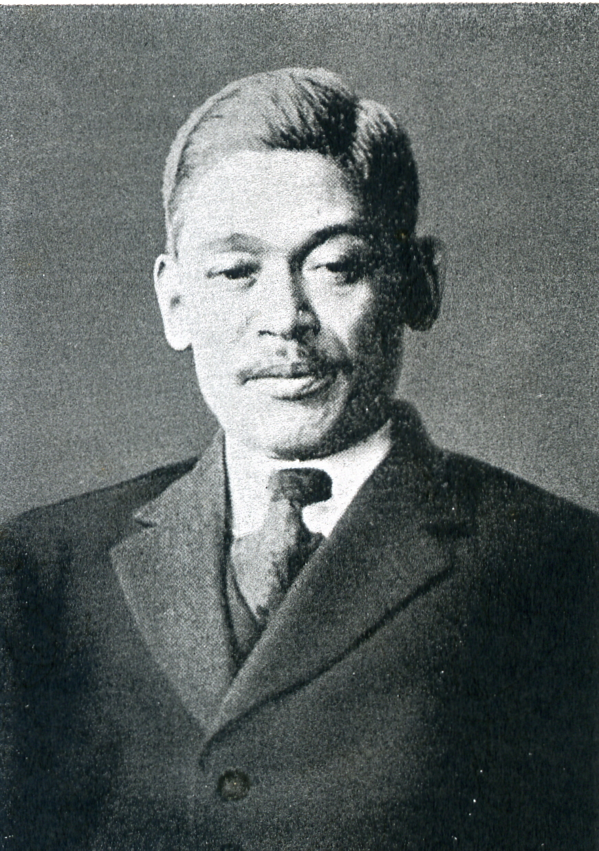 この写真は、河上哲太（1881-1952）の写真です。